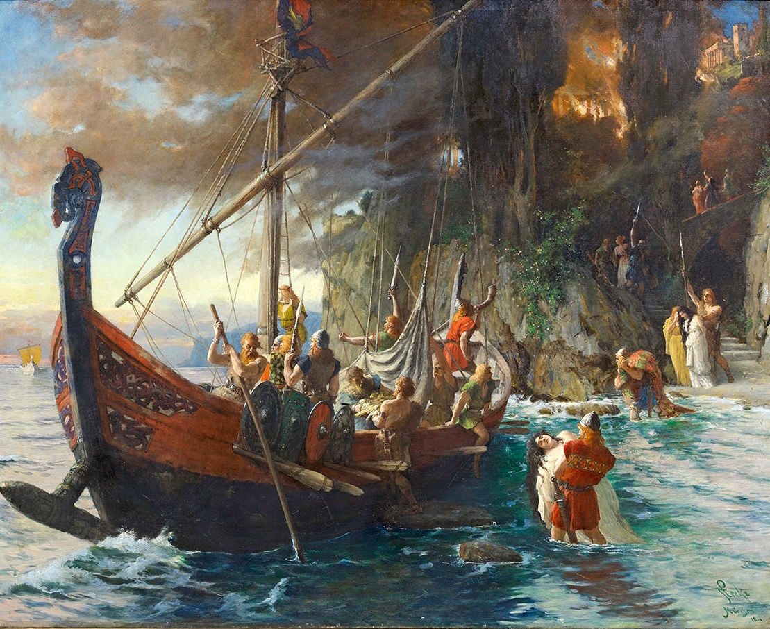 "Ein Wikingerüberfall" (Originaltitel); Öl auf Leinwand, rechts unten signiert und datiert 1901 mit Ortsangabe München. 118 cm x 152 cm